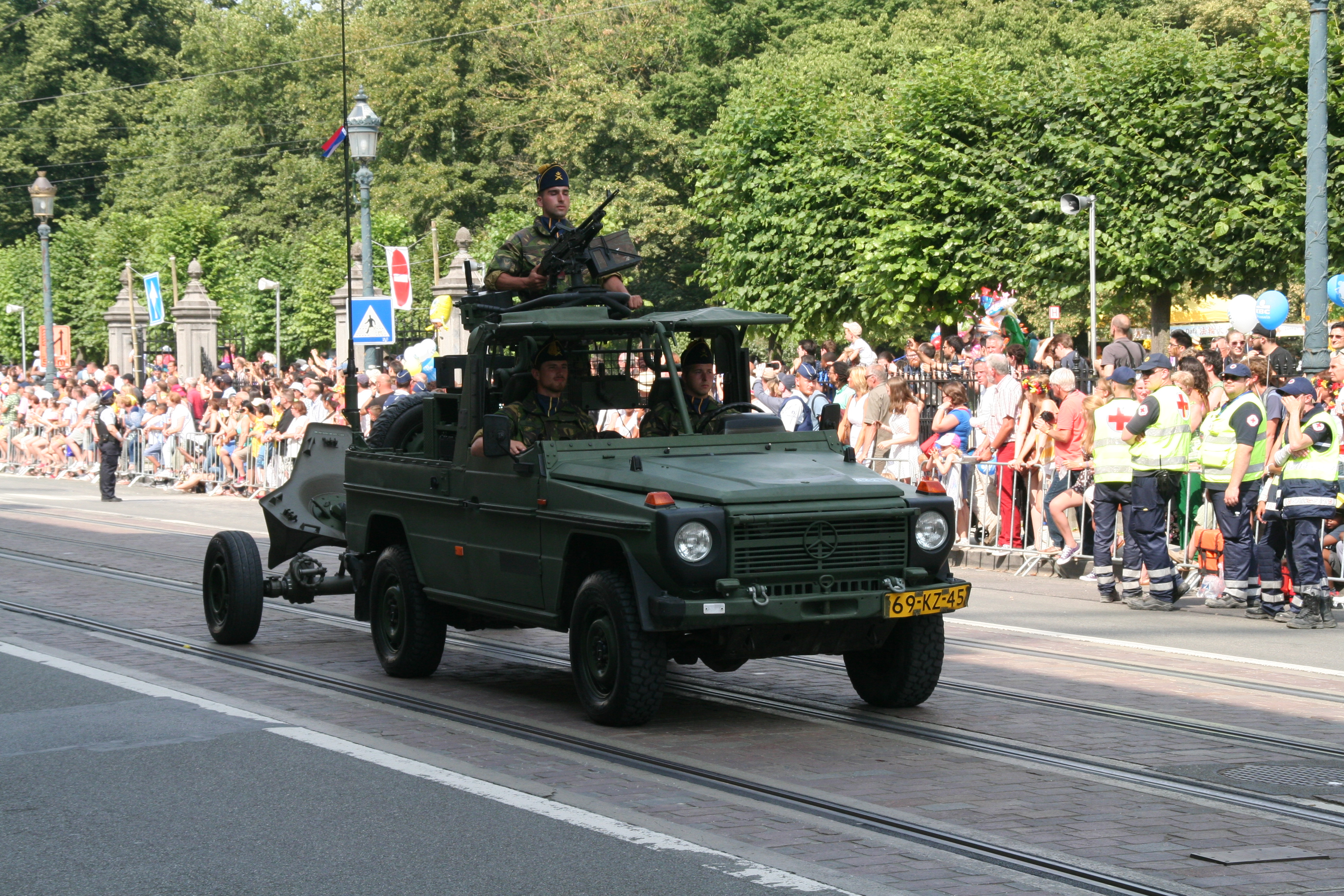 Fête nationale belge à Bruxelles le 21 juillet 2016 - Armée belge (Défense)